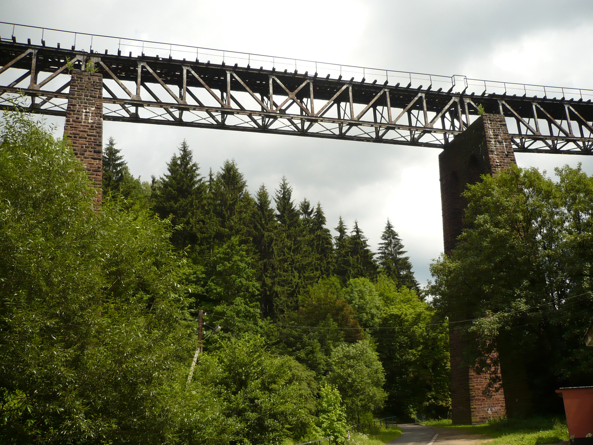 Nowa Ruda - wiadukt kolejowy nad Woliborką, 1879-1880